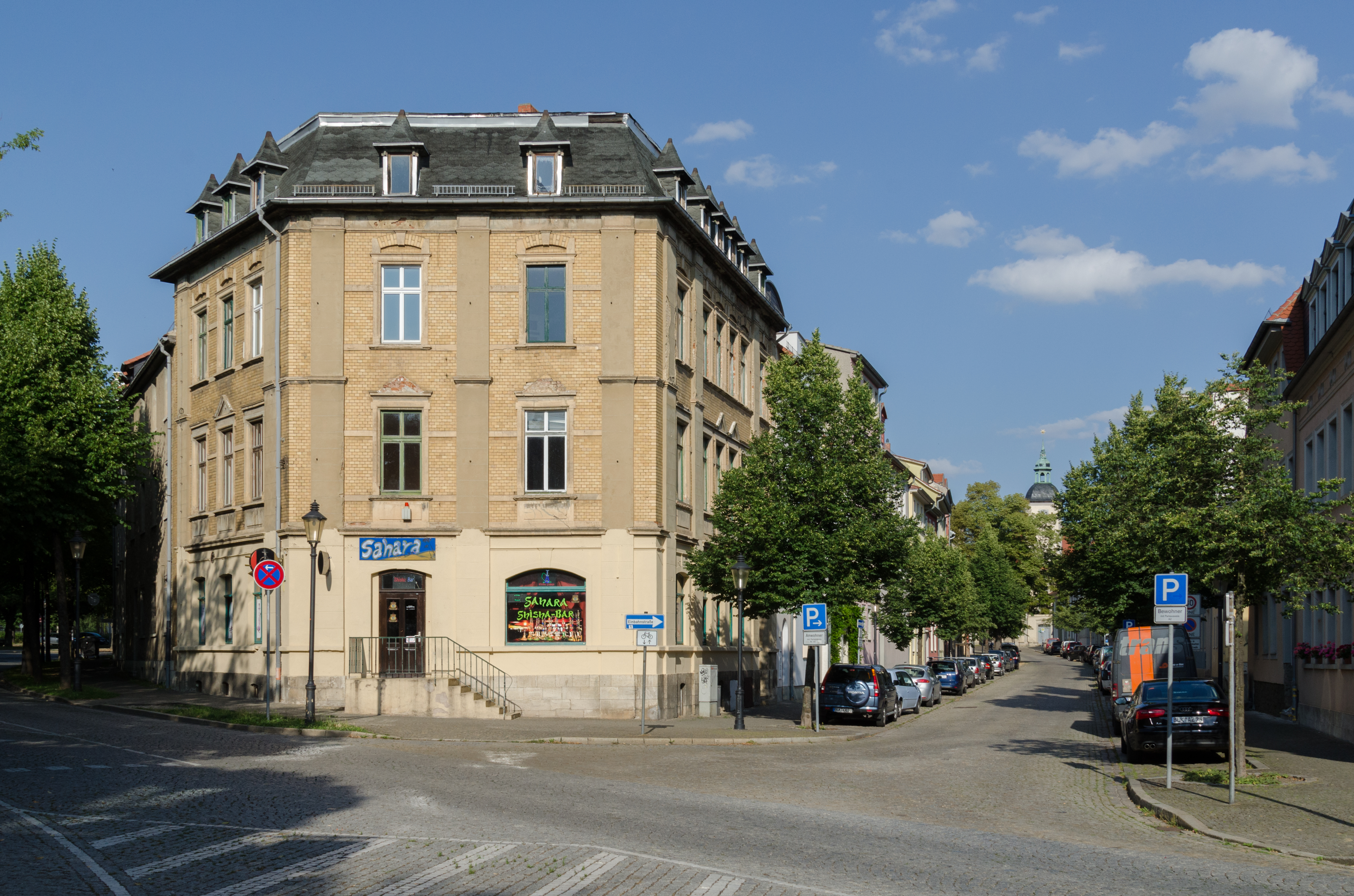 Naumburg, Fischstraße 19